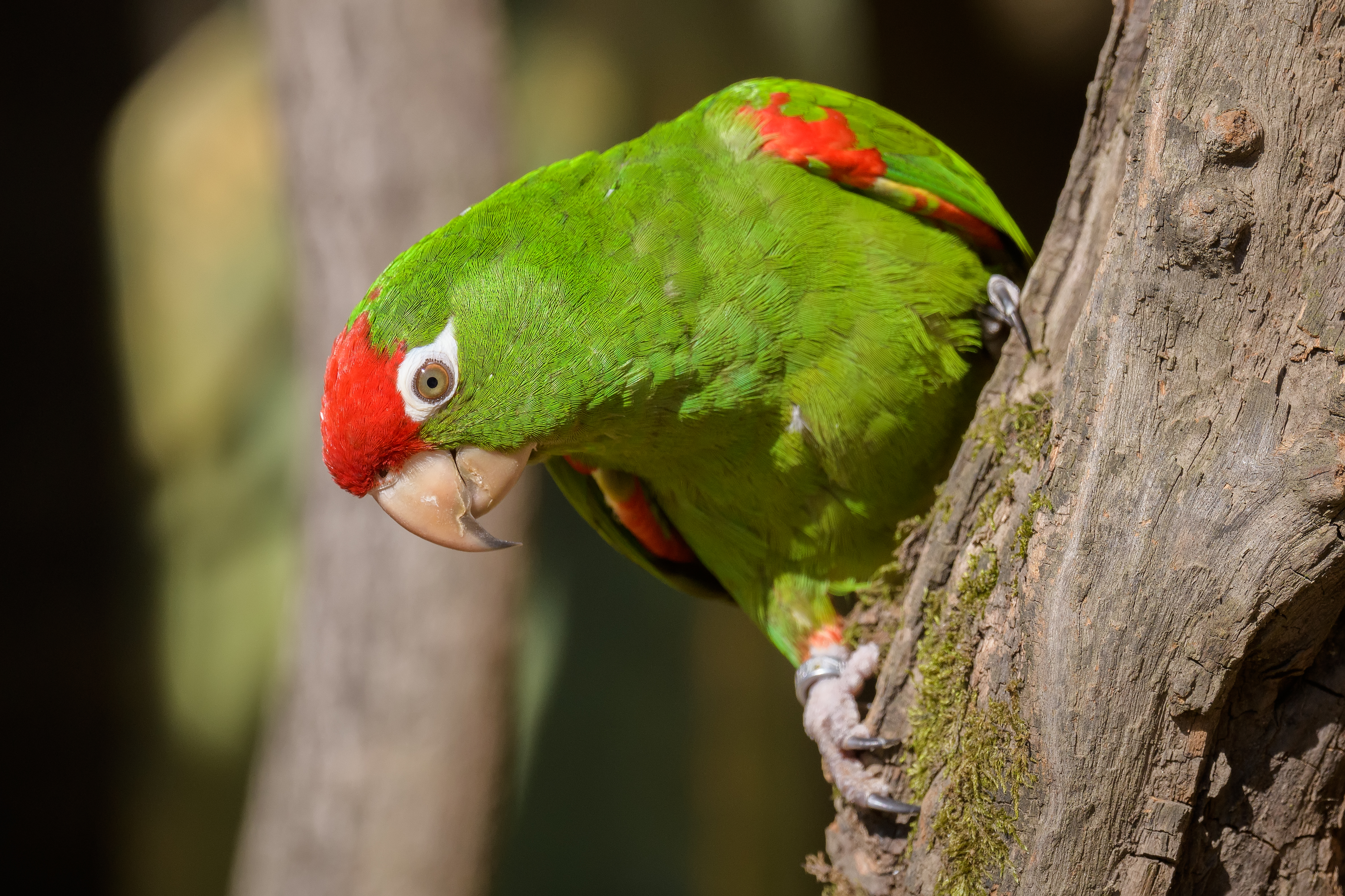 Aratinga andský v Zoo Praha, v nové expozici při Rákosově pavilonu